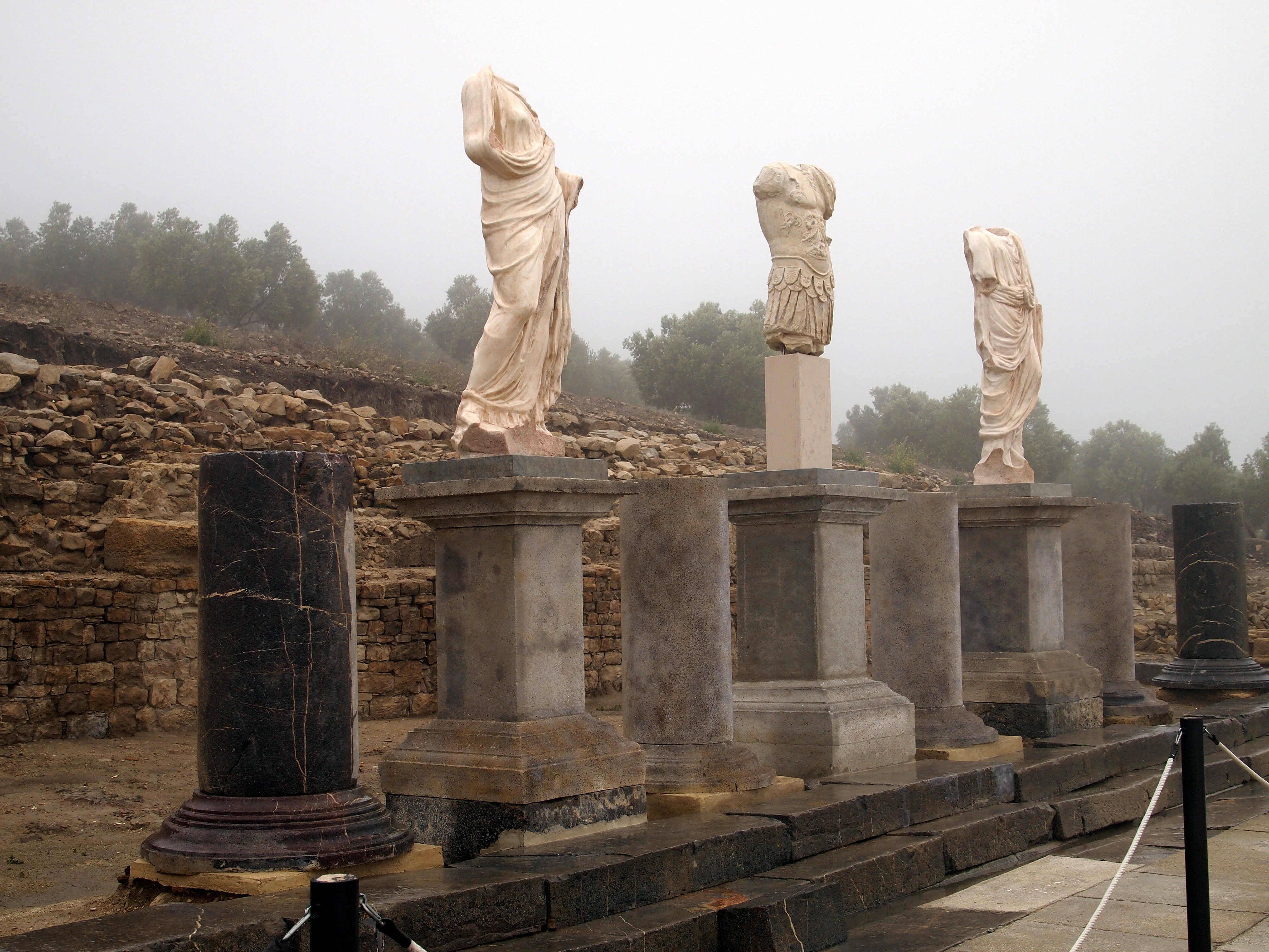 En el lado norte del foro romano. Torreparedones, Baena (Córdoba).